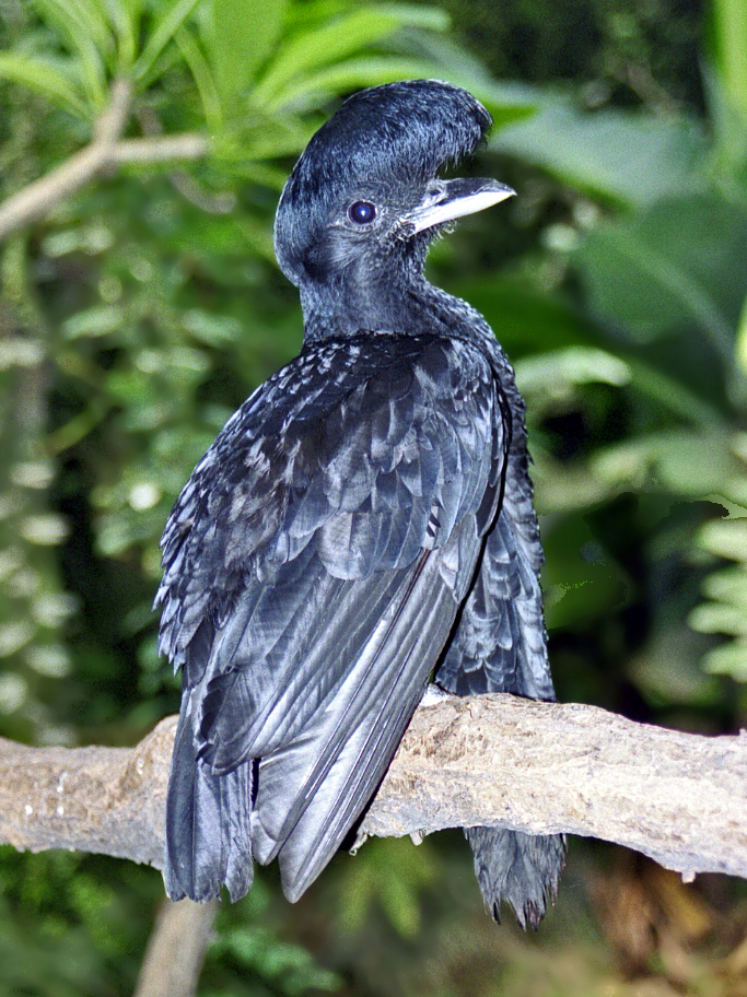 Cephalopterus penduliger at Skansen, Stockholm